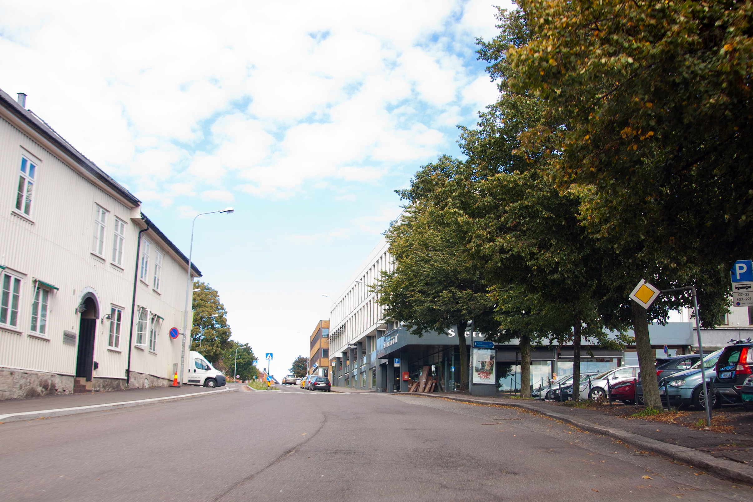 Tollbodgaten i Tønsberg. Fylkesvei 466.